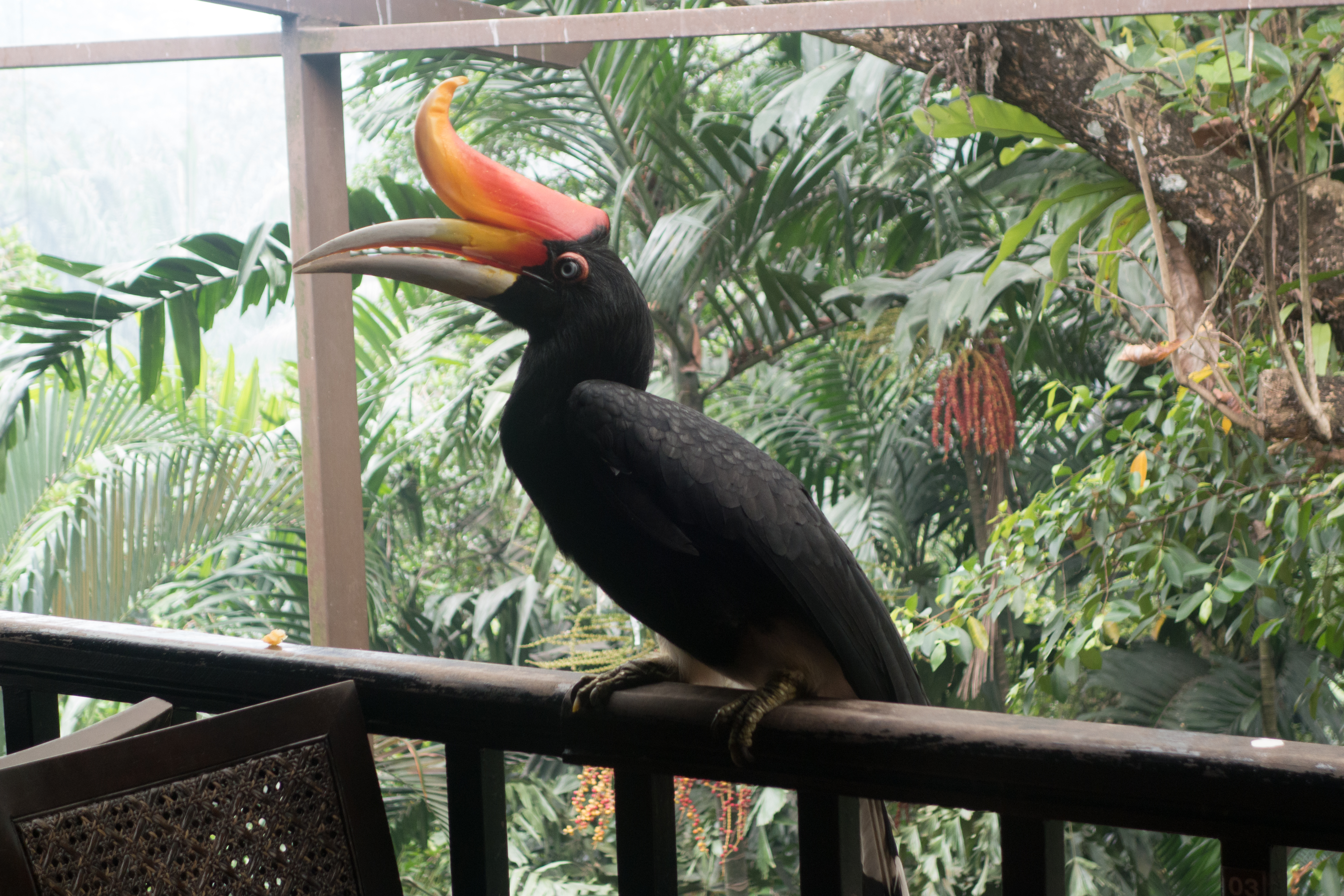 Kuala Lumpur 2015